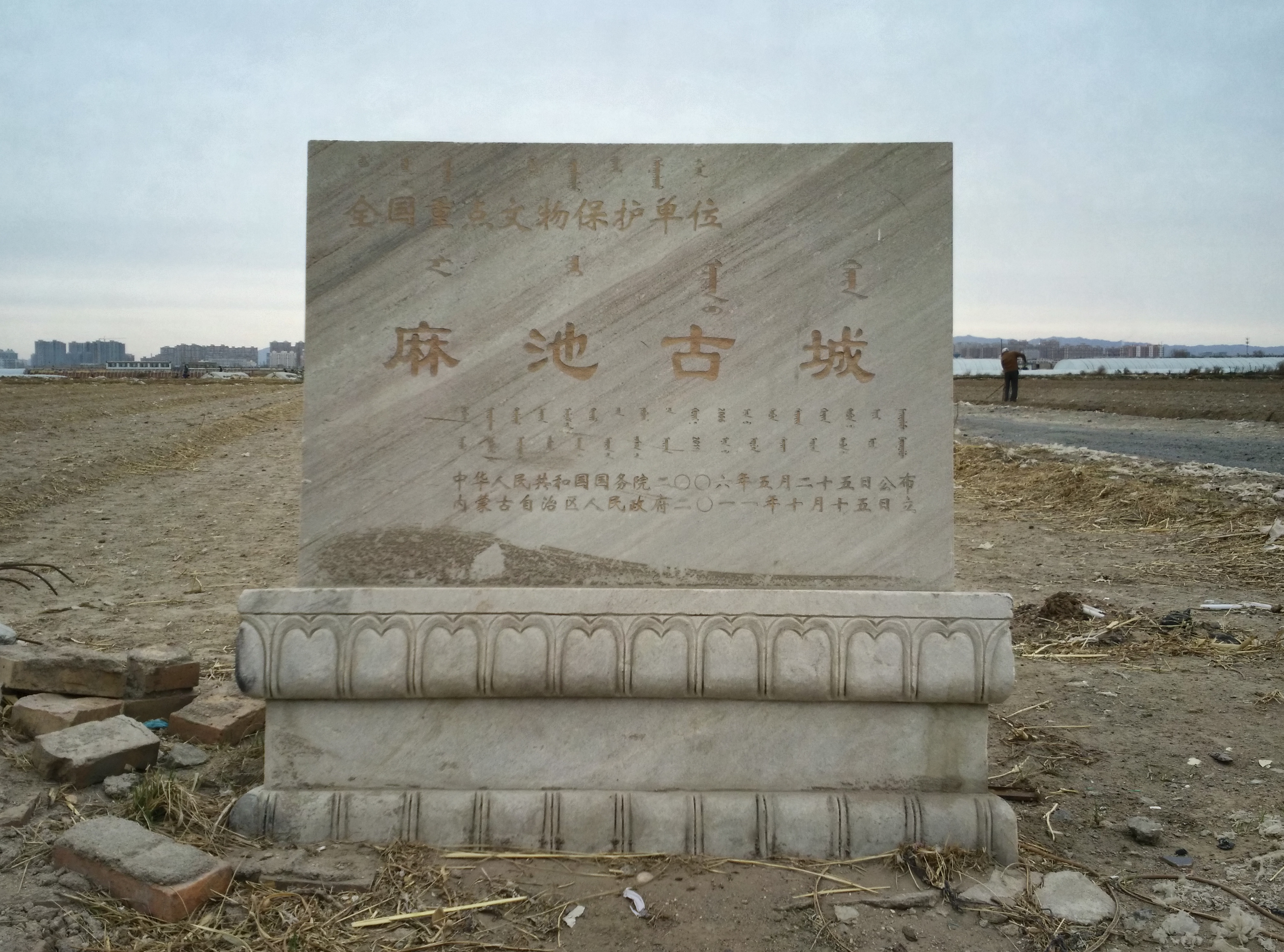 中文（中国大陆）: 麻池古城全国重点文物保护单位碑